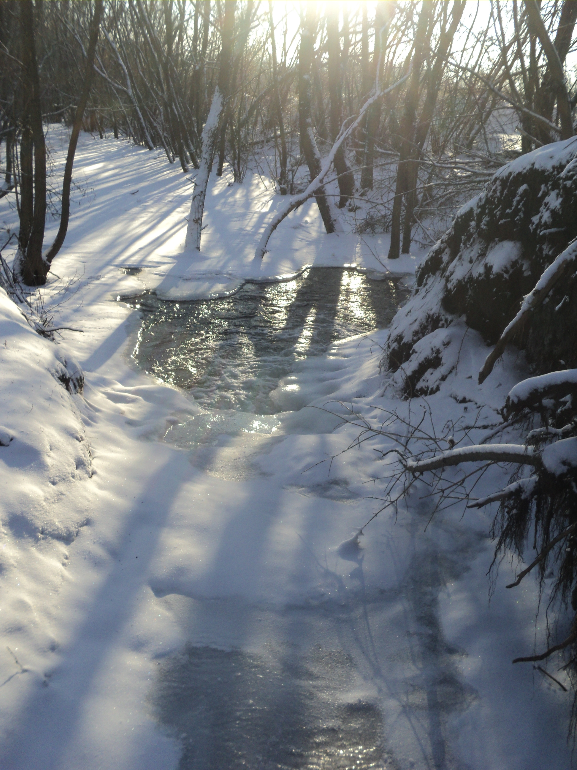 Избердейка под БИз